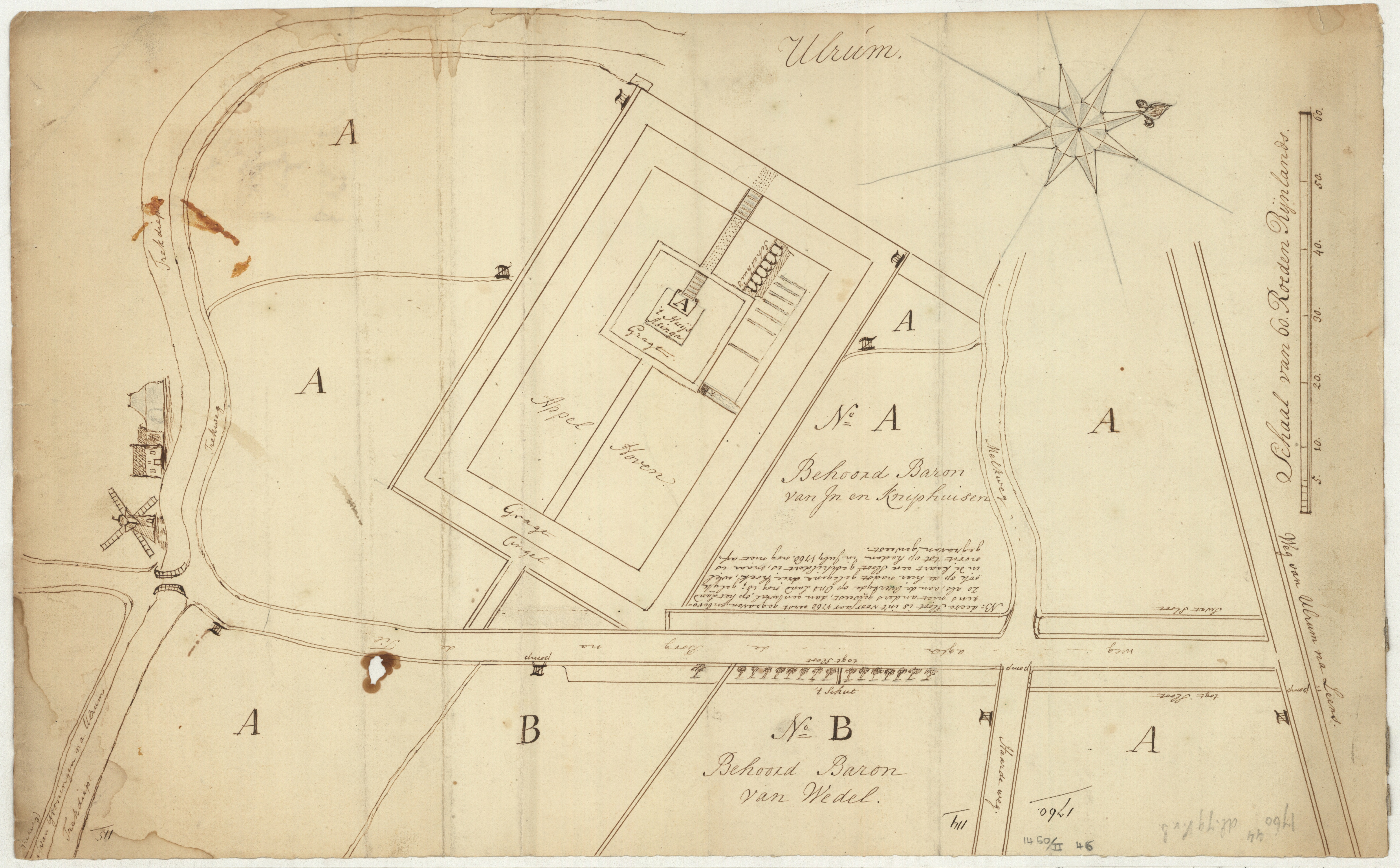 Kaart van het terrein van 't Huis Asinga te Ulrum met een gedeelte der omringende landen. Met aanduiding van enkele pompen en een molen, enkele eigenaren van landerijen. Met kompasroos en schaalstok